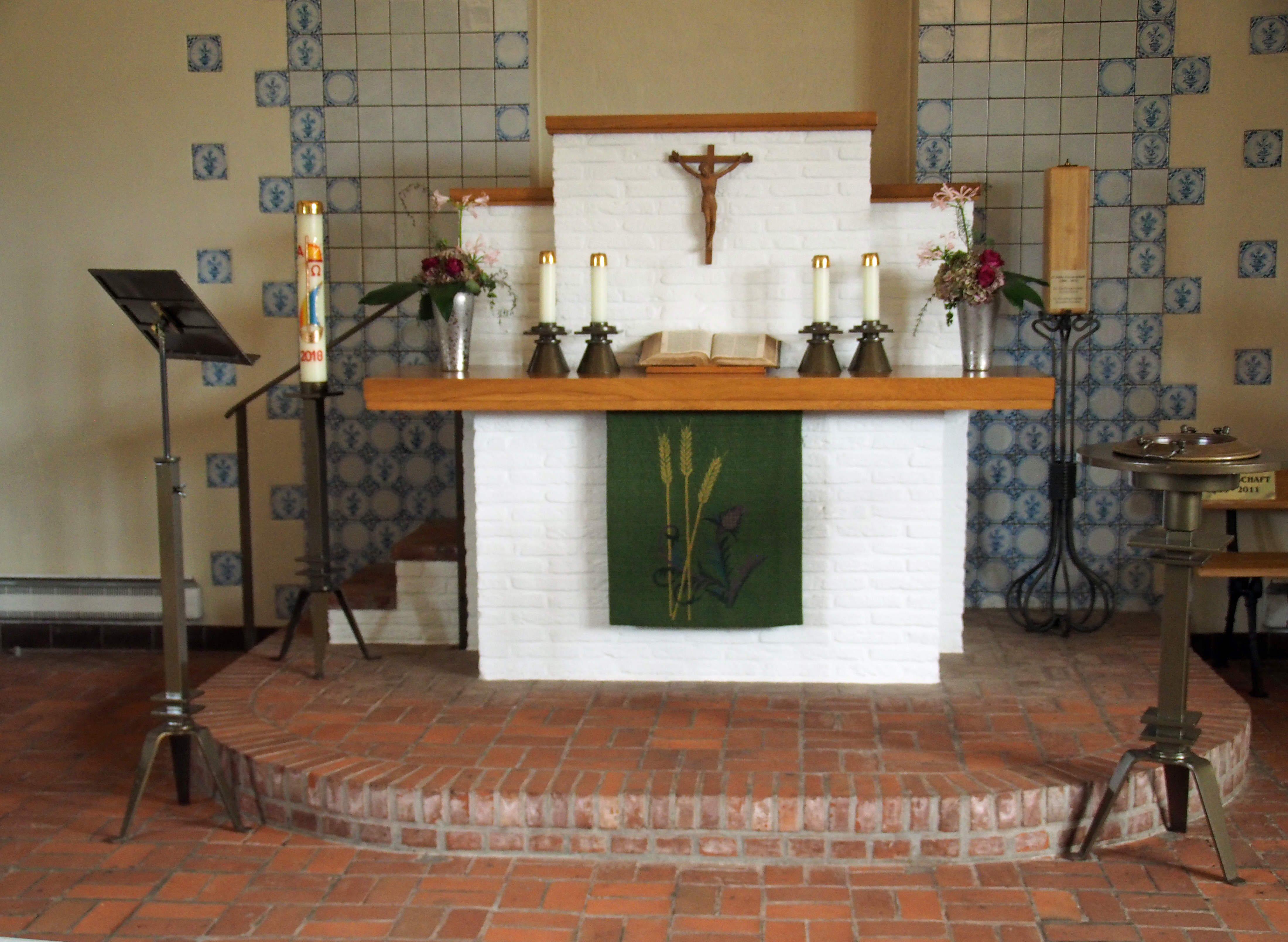 Altar der Friesenkapelle in Wenningstedt (Sylt)